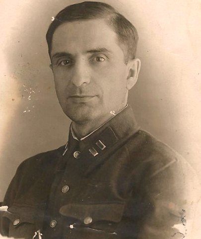 Əsədov Məmmədhüseyn